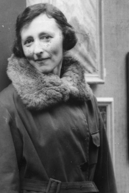 Lagertha Munthe (1888-1984) var en norsk kunstner. Bildet er tatt ca. 1935, ifølge Oslo Museum.